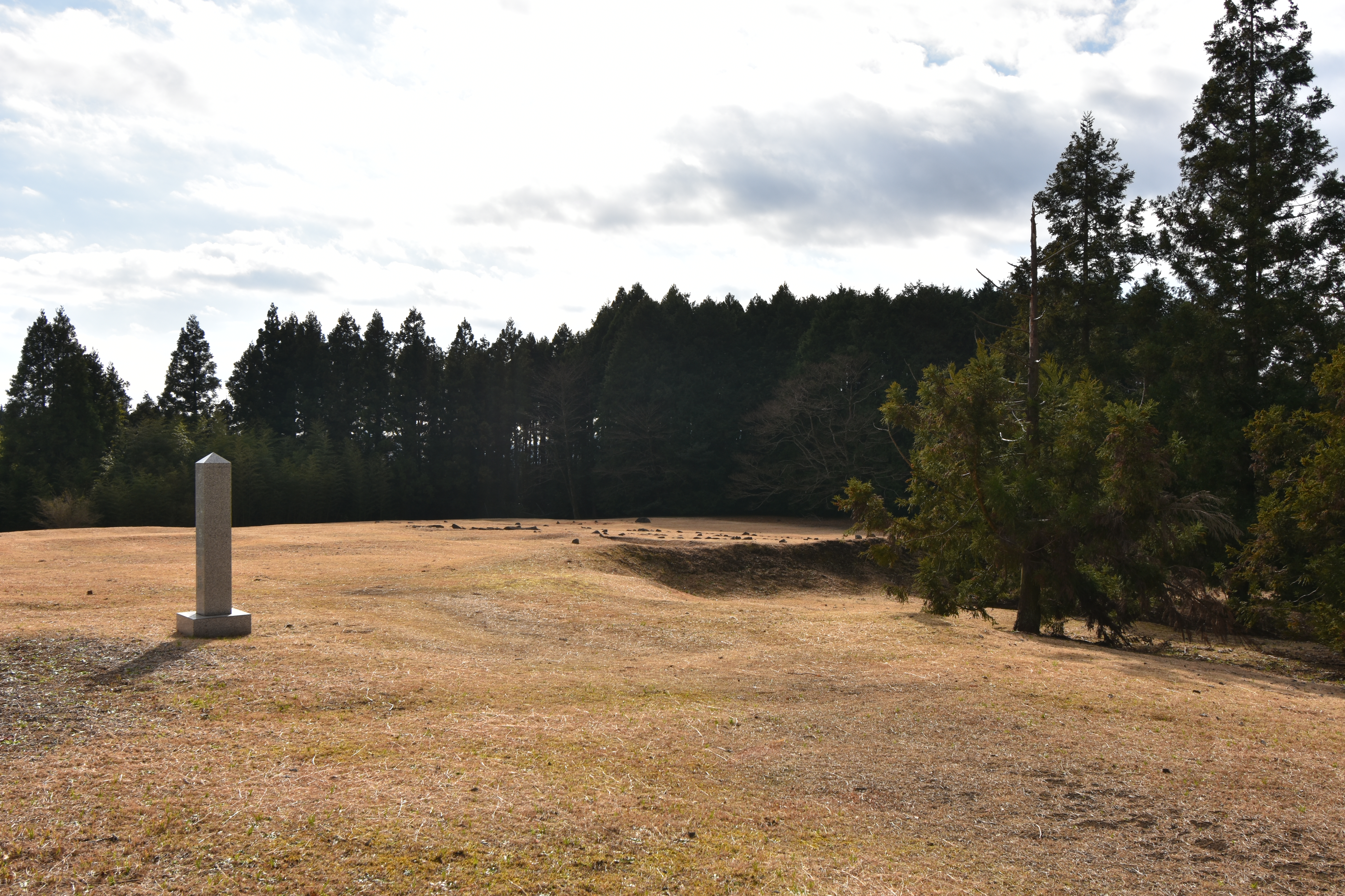 千居遺跡（静岡県富士宮市上条）